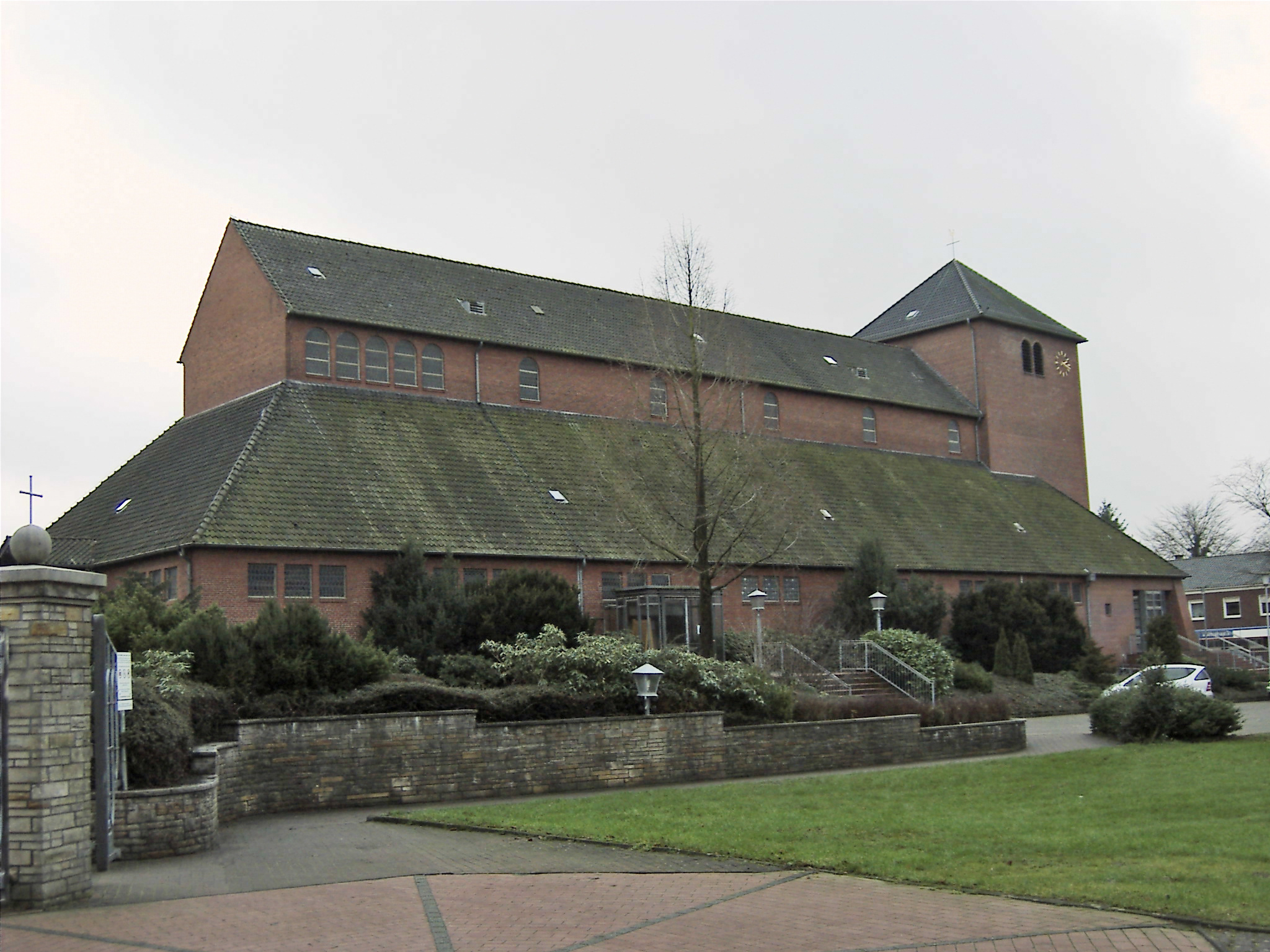 St. Josef-Basilika in Lingen-Laxten